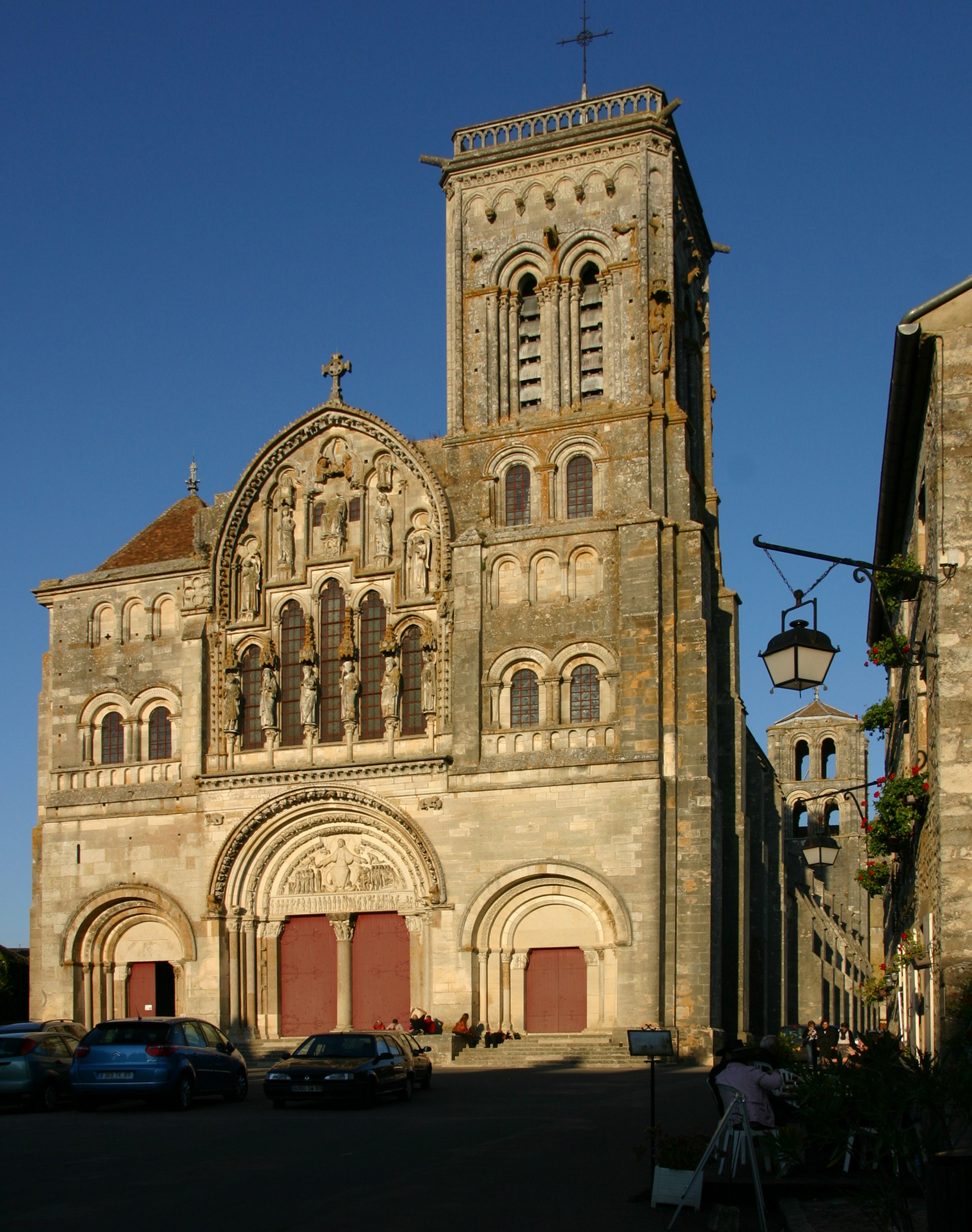 Vézelay, Basilika Sainte-Marie-Madeleine